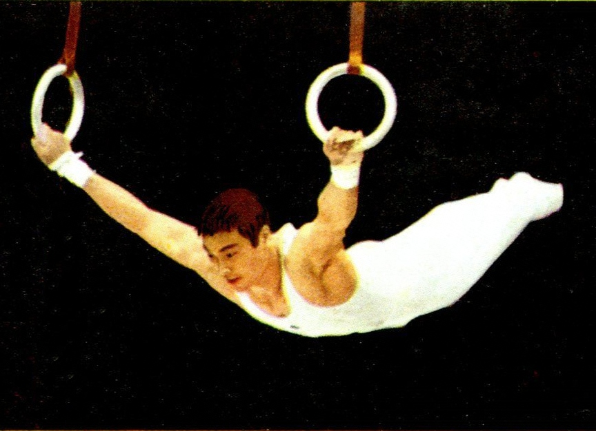 MUNCHEN 72 - Figurina-Stickers - Panini - N° 226 - TSUKAHARA -GIA